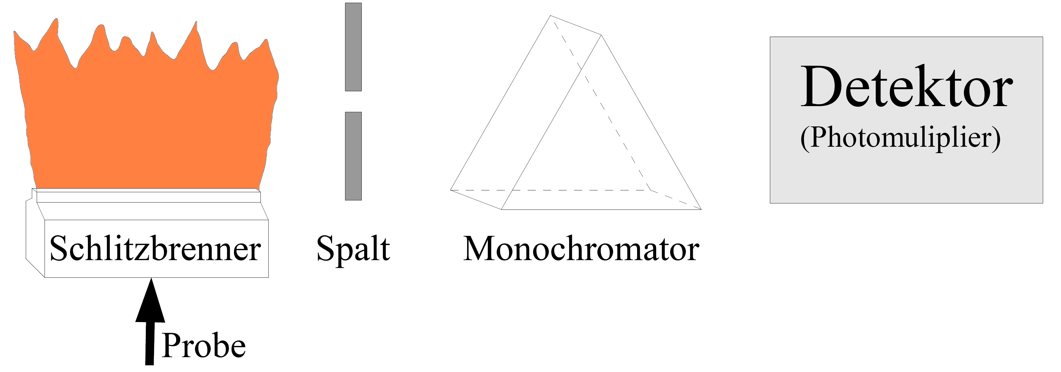 Flammenphotometer, gezeichnet mit openoffice, paint und gimp von Talos 4. Jul 2005 18:34 (CEST)